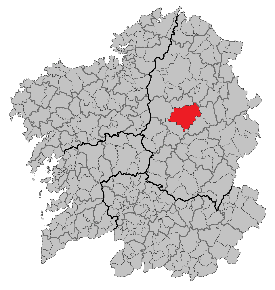 Mapa coa localización do concello de Lugo.